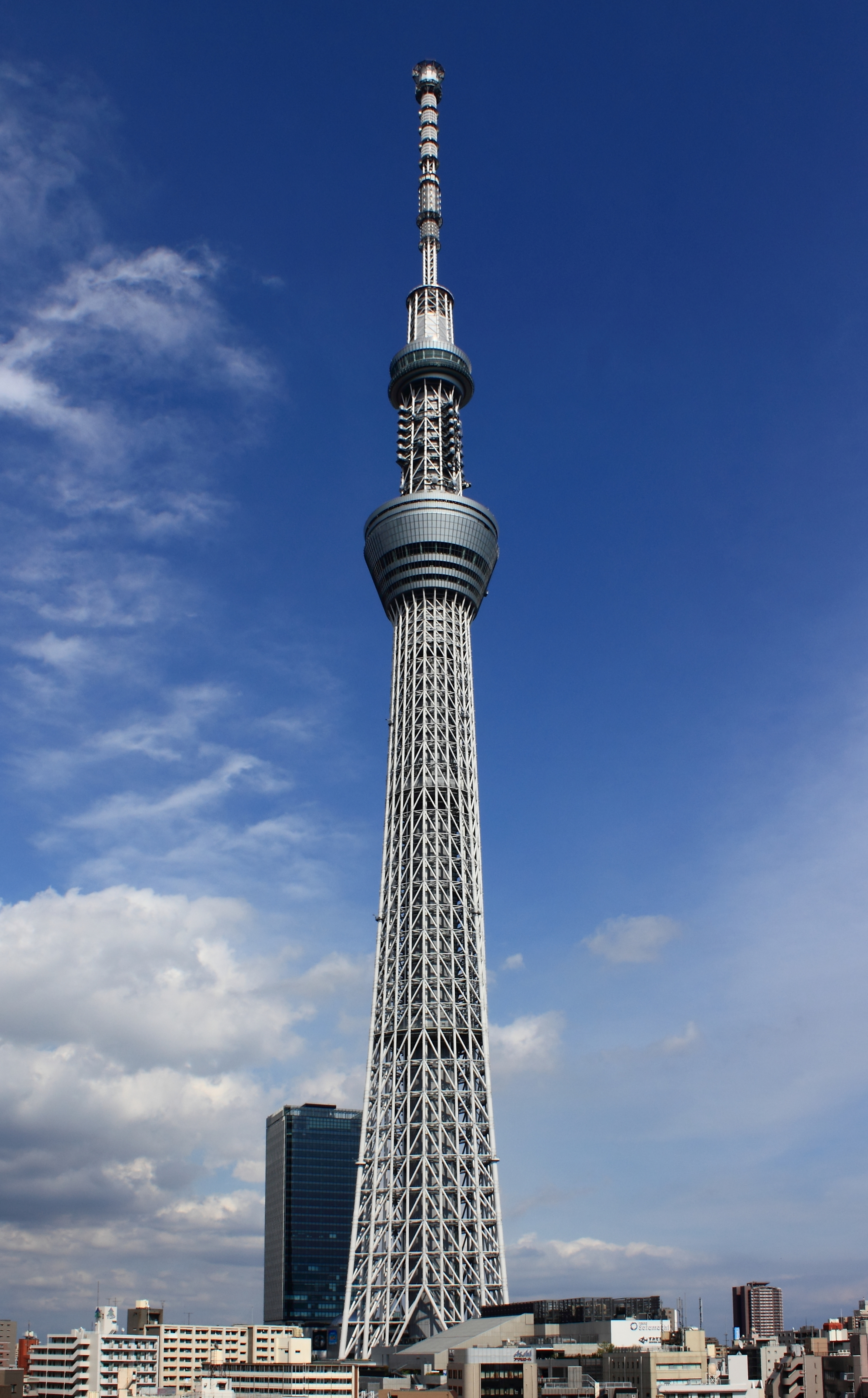 東京スカイツリー（東京都墨田区）。西から。